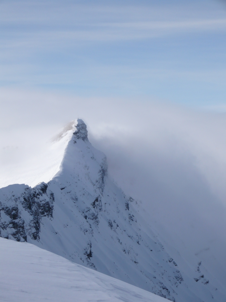 Aiguille croche, Savoie, France